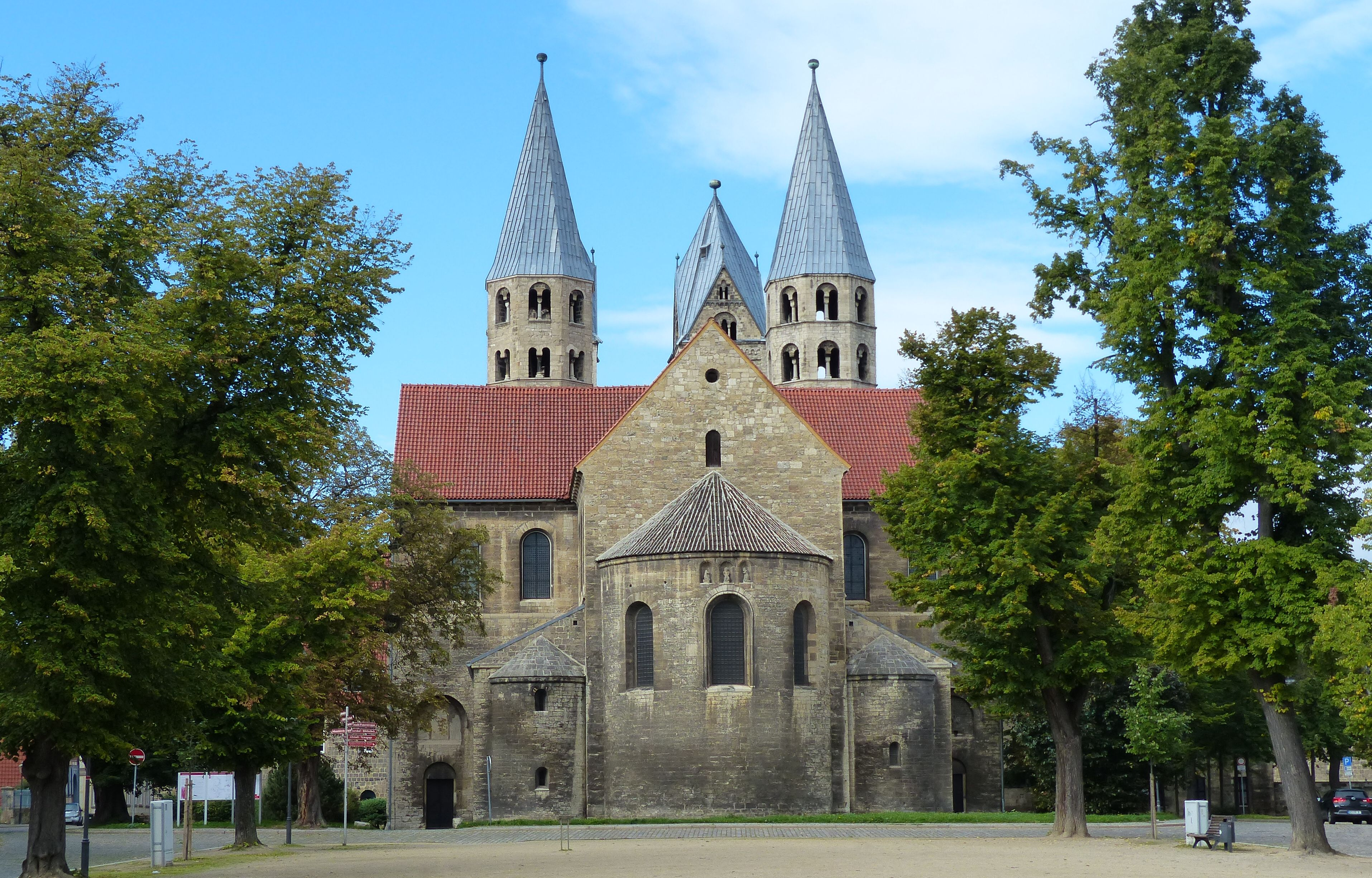 Die romanische Kirche in der im Wesentlichen bis jetzt erhaltenen Form wurde 1146 geweiht. Die beiden Westtürme wurden bald danach hinzugefügt. Im Inneren sind die Chorschranken von großem kulturhistorischem Wert.